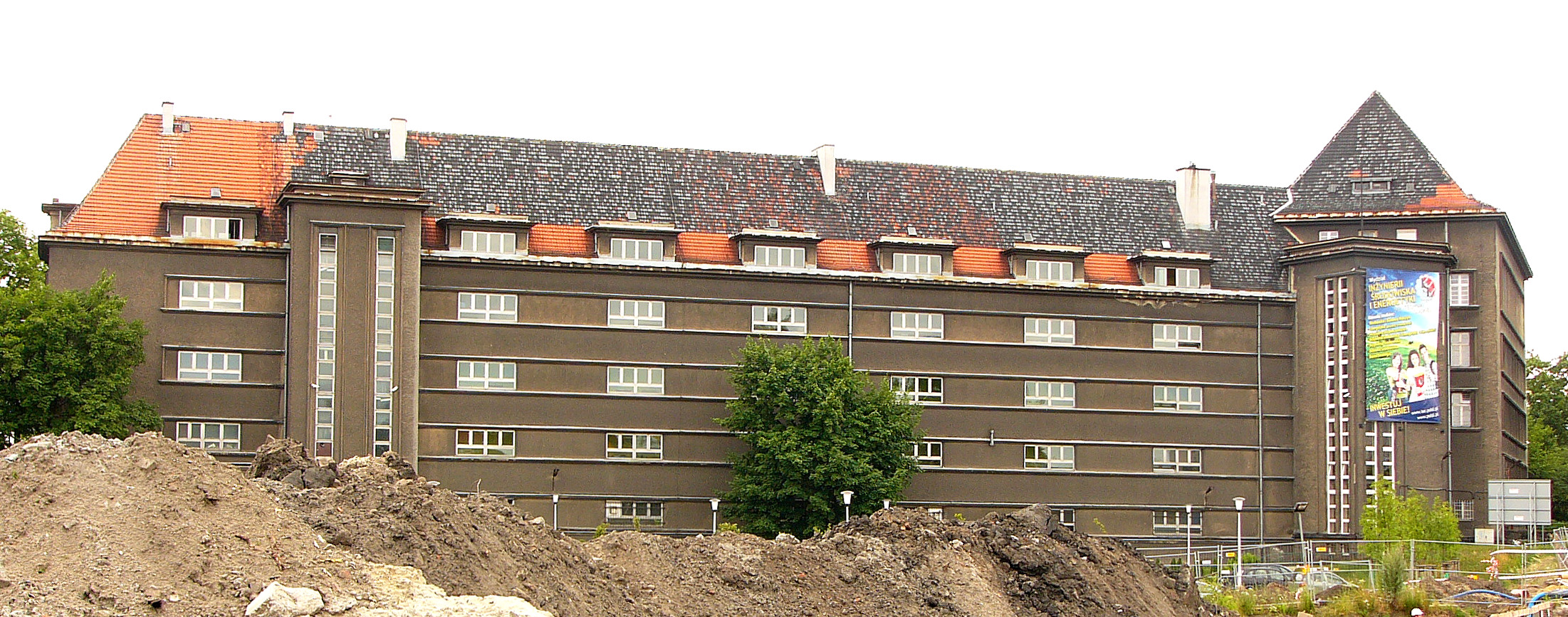 Budynek Wydziału Inżynierii Środowiska i Energetyki.